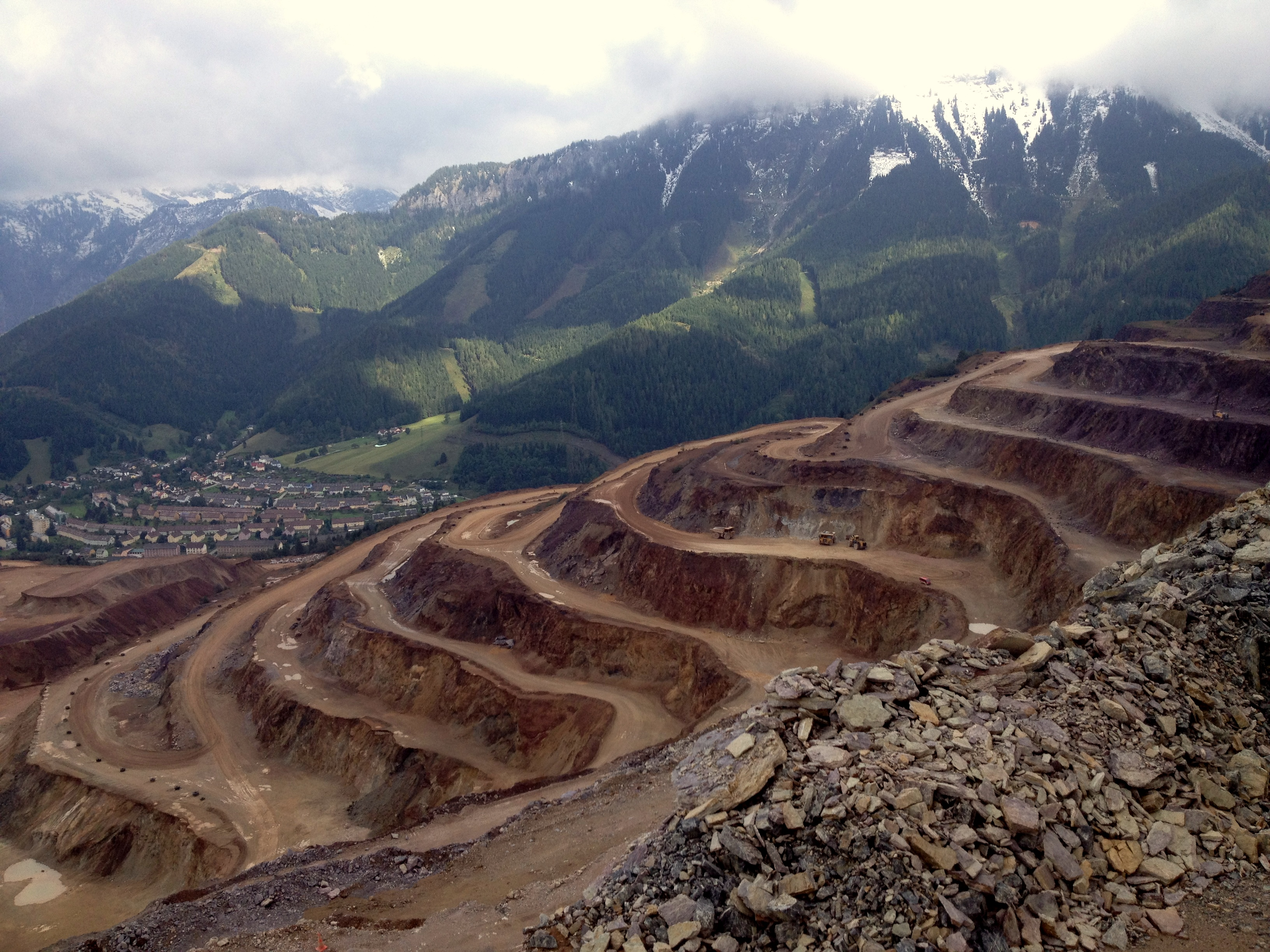 Erzberg von Etage Dreikönig aus gesehen